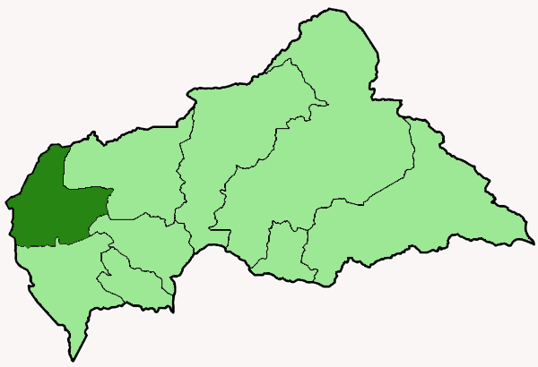 Mappa della diocesi cattolica di Bouar, nella Repubblica Centrafricana. Anno 2009.